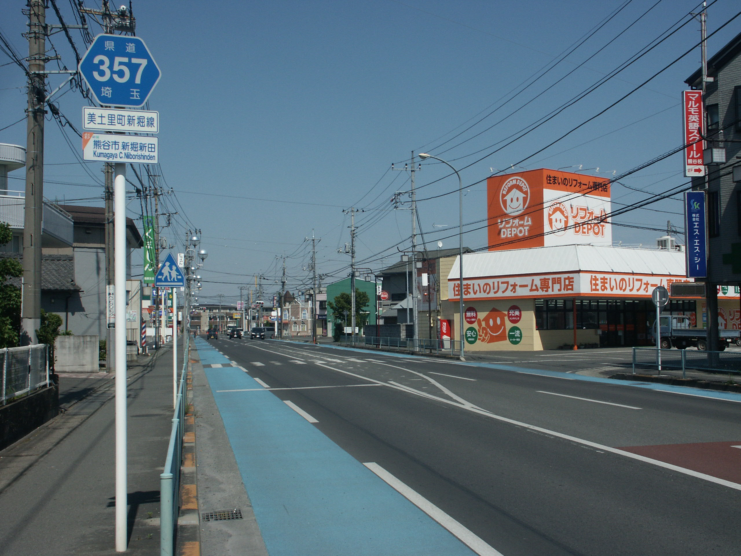 埼玉県道357号線熊谷市新堀新田付近（国道17号線方面を撮影）